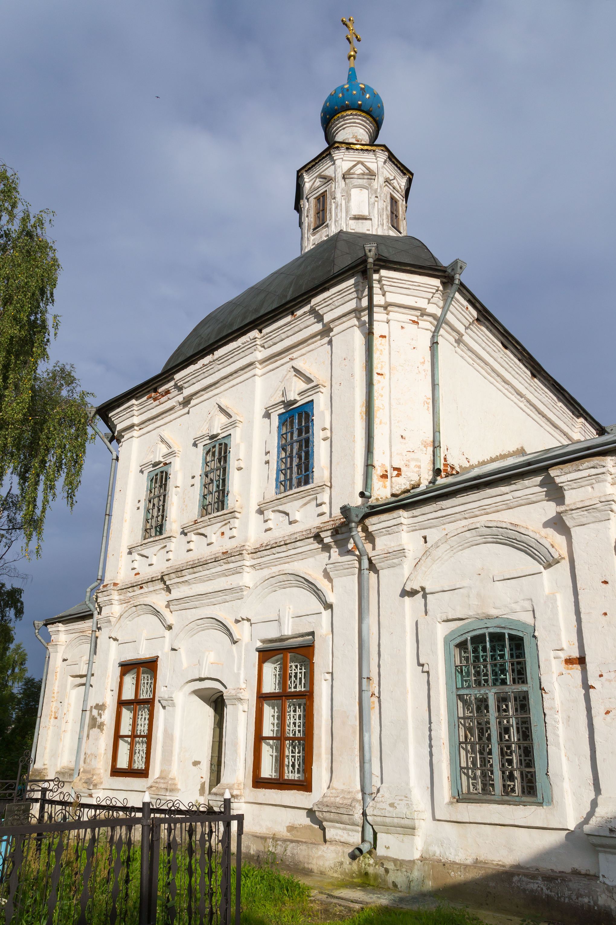 Церковь: Ликино, Судогодский район, Владимирская область